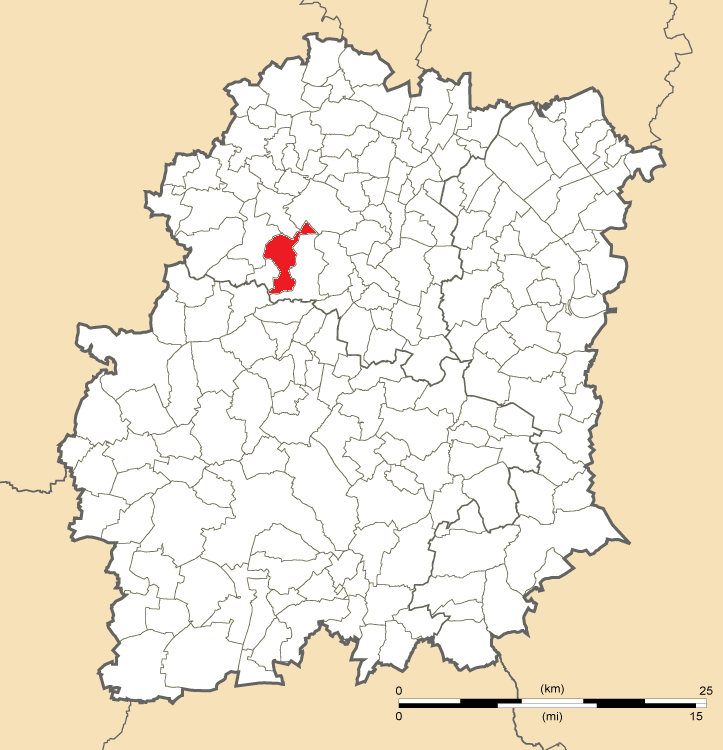 Carte de position de Fontenay-lès-Briis en Essonne (91)